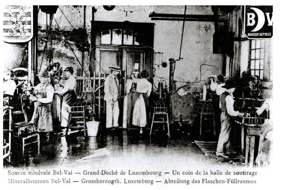 Eng Postkaart vun der Mineralwaasserquell Bel-Val ufangs vum 20. Joerhonnert.